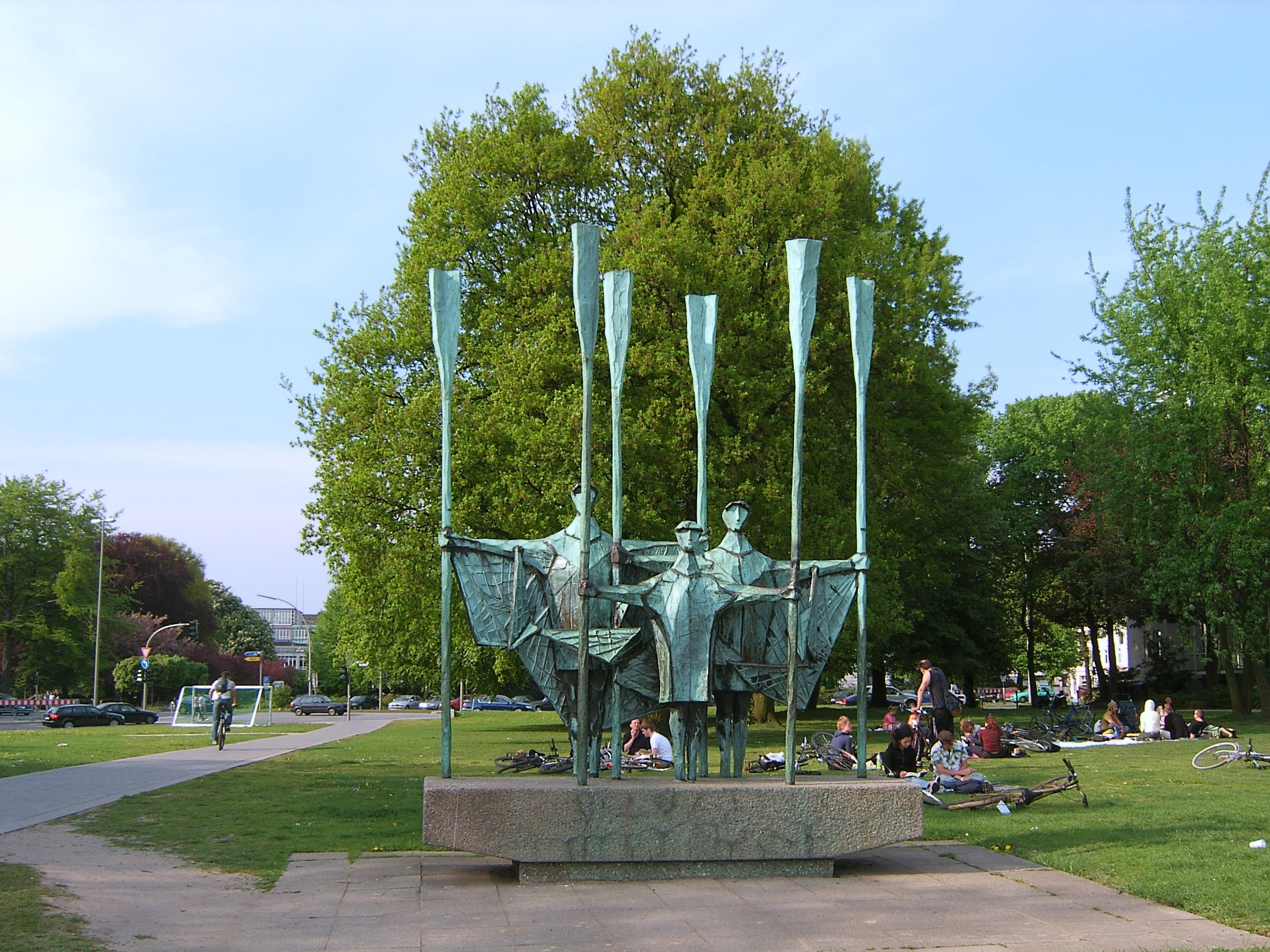 Hamburg, Altona Maritim von Gerhard Brandes (1965